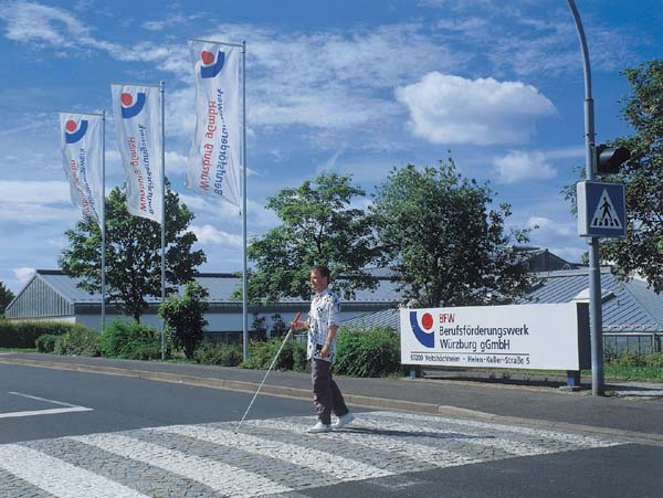 Berufsförderungswerk Würzburg, Außenansicht